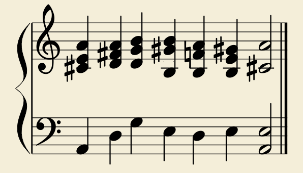 Modulation von Heinrich Schütz aus SWV 379